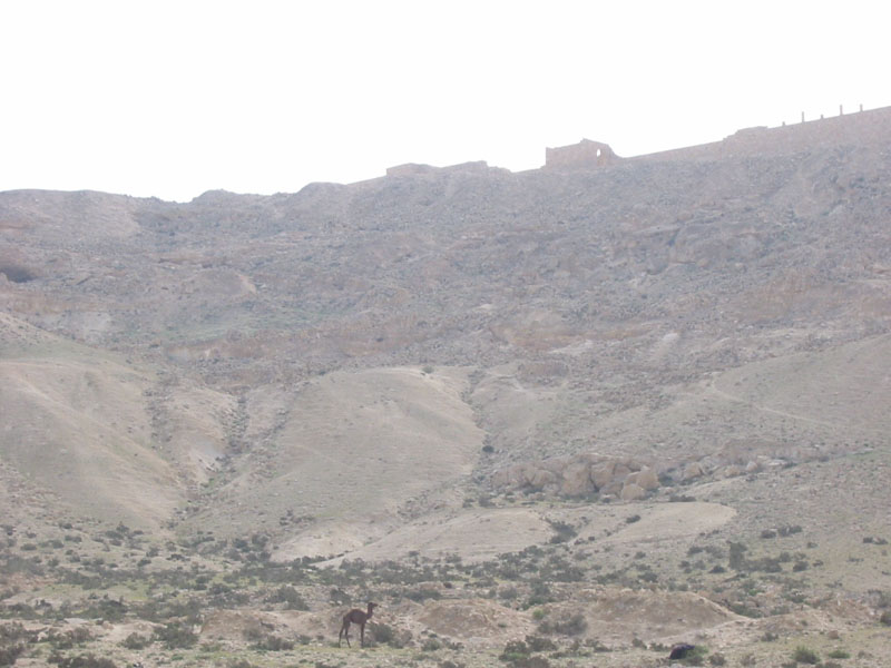 Negev-Wüste mit Kamel